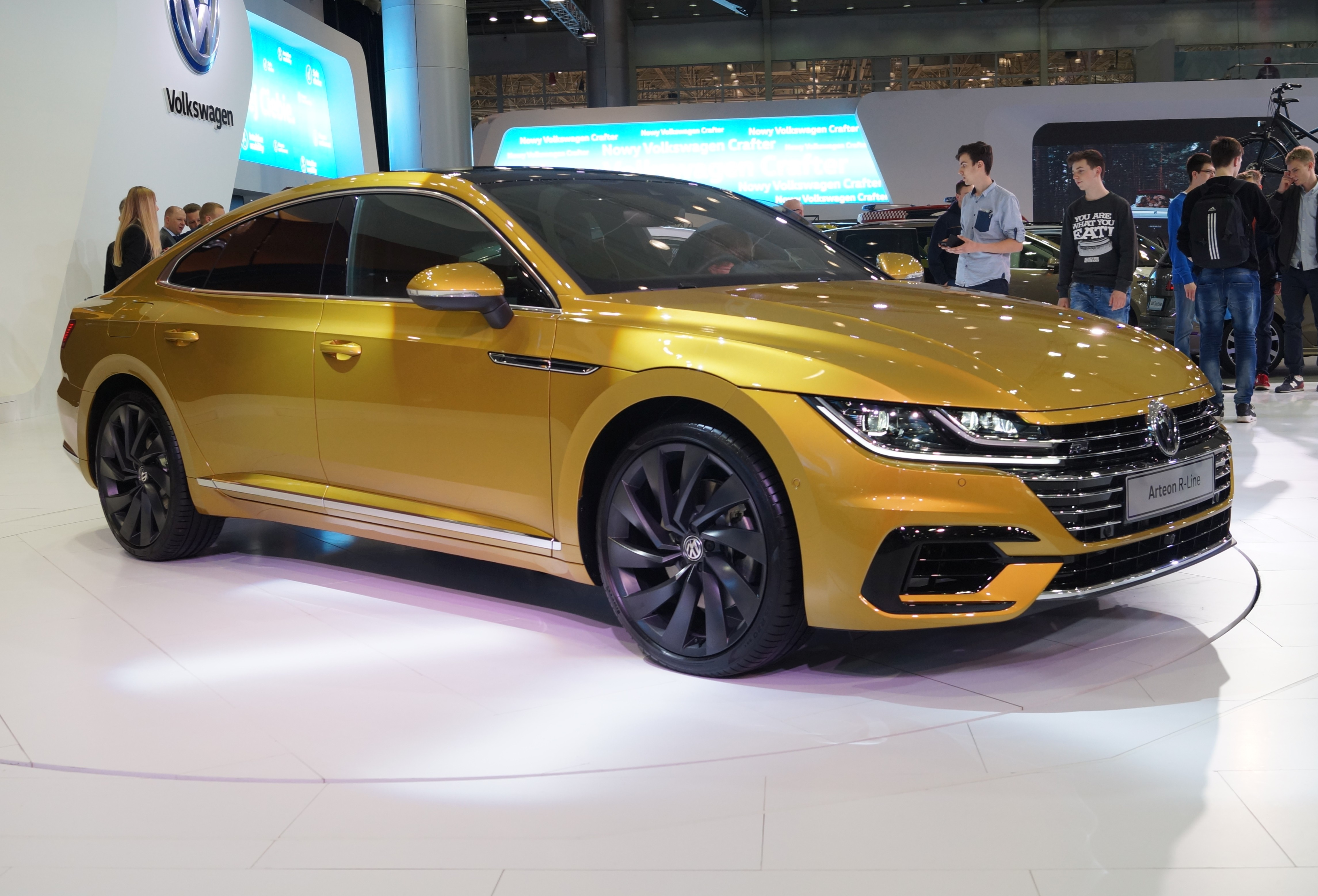 Prawy przód Volkswagena Arteon R-Line na Motor Show Poznań 2017.